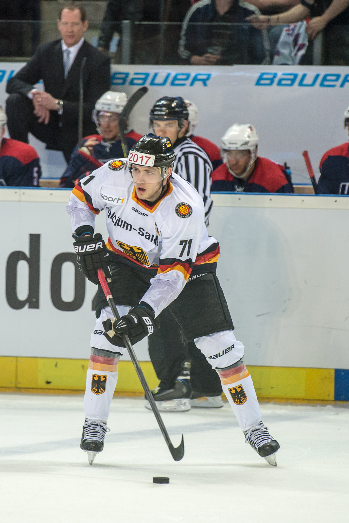 Leon Draisaitl im WM-Vorbereitungsspiel gegen die USA in Nürnberg